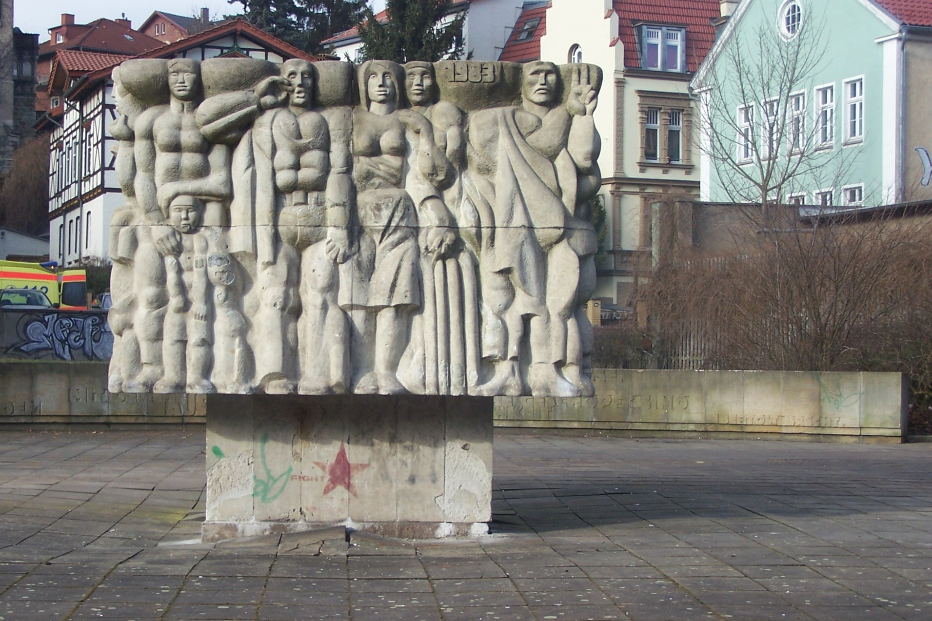 Das Bildmotiv (1983) symbolisiert das Karl-Marx-Jahr 1983 - zugleich das Jahr der Denkmalseinweihung. Neben dem vierflächigen Betonkubus erkennt man im Hintergrund einen Abschnitt der mit Brecht-Zitaten ausgestalteten Platzumrandung.